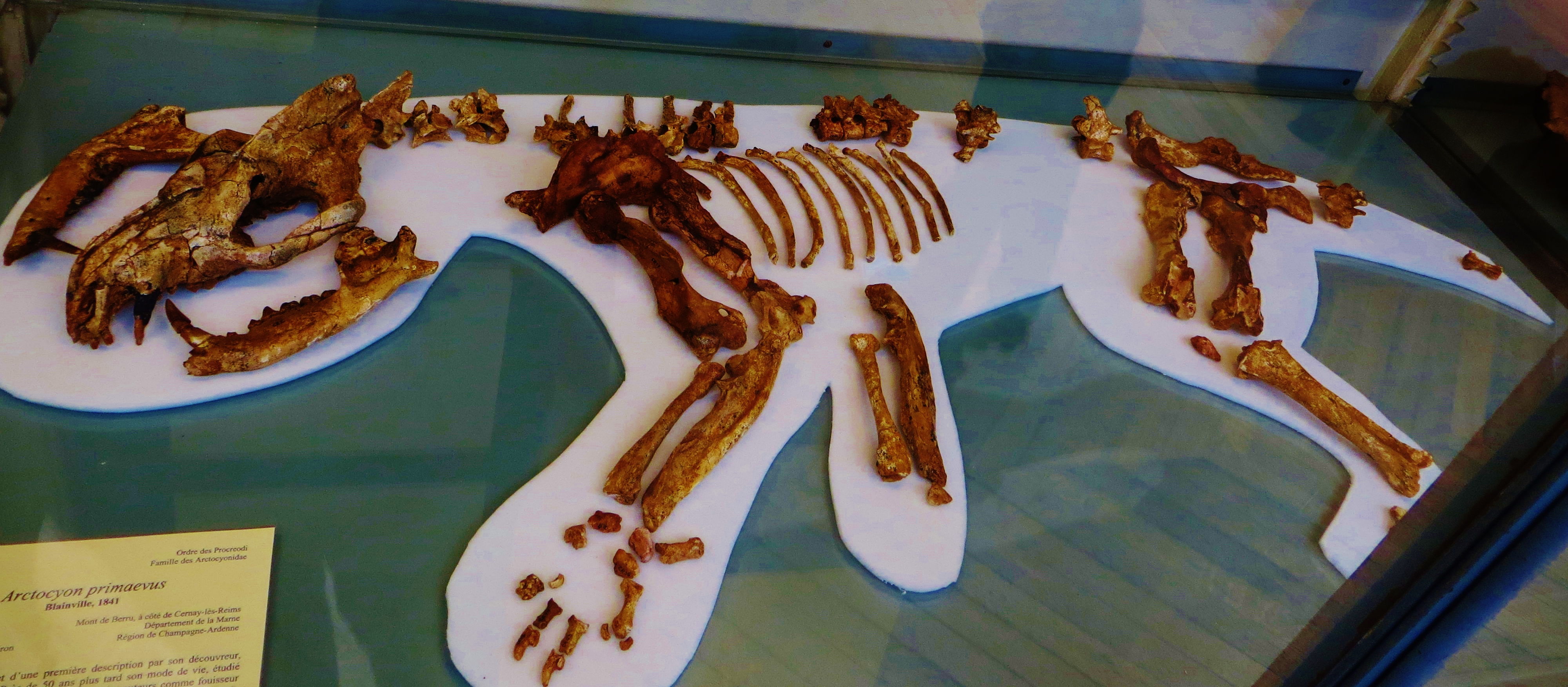 Fossil of Arctocyon, an extinct mammal- Took the photo at Museum Histoire Naturelle, Paris